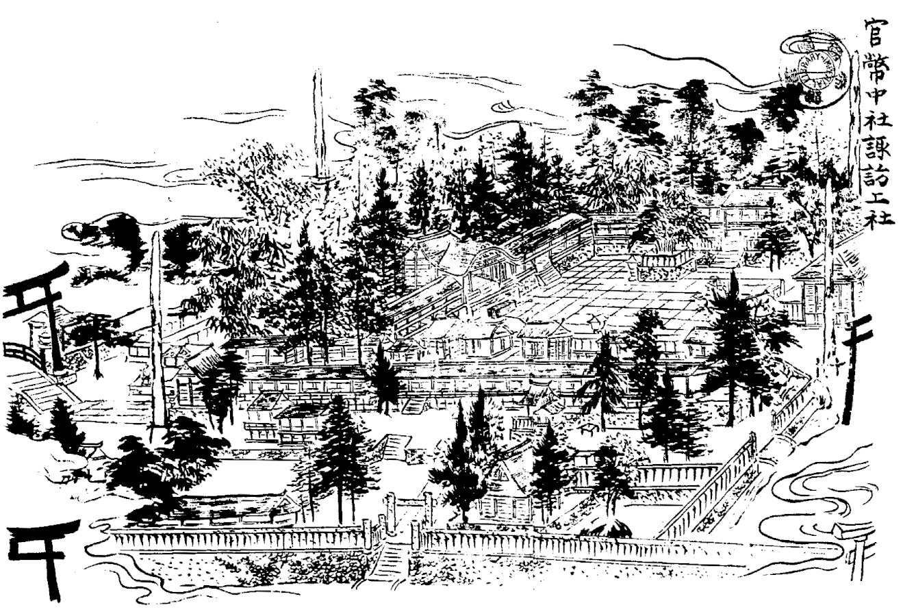 「官幣中社諏訪上社」（守矢実久編『諏訪神社略縁起』より）